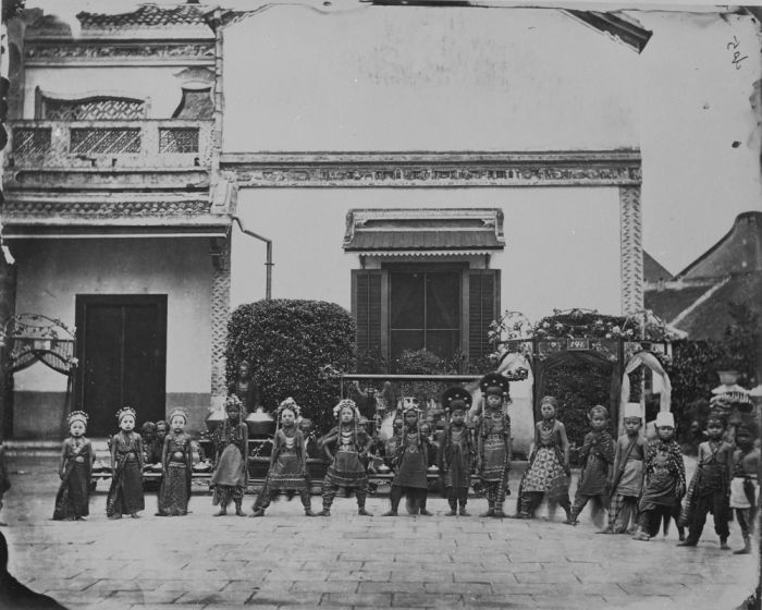 foto. Javaanse kinderen met gamelanorkest voor het huis van de Majoor der Chinezen Be Biauw Tjoan, gereed voor een dansvoorstelling